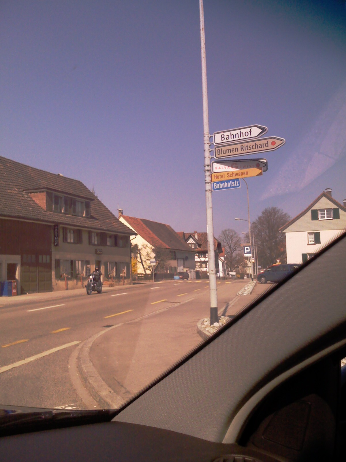 Felben-Wellhausen, Kantono Turgovio, Svislando